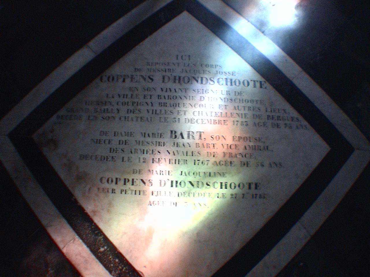 Dalle funéraire de Jacques-Josse Coppens d'Hondschoote